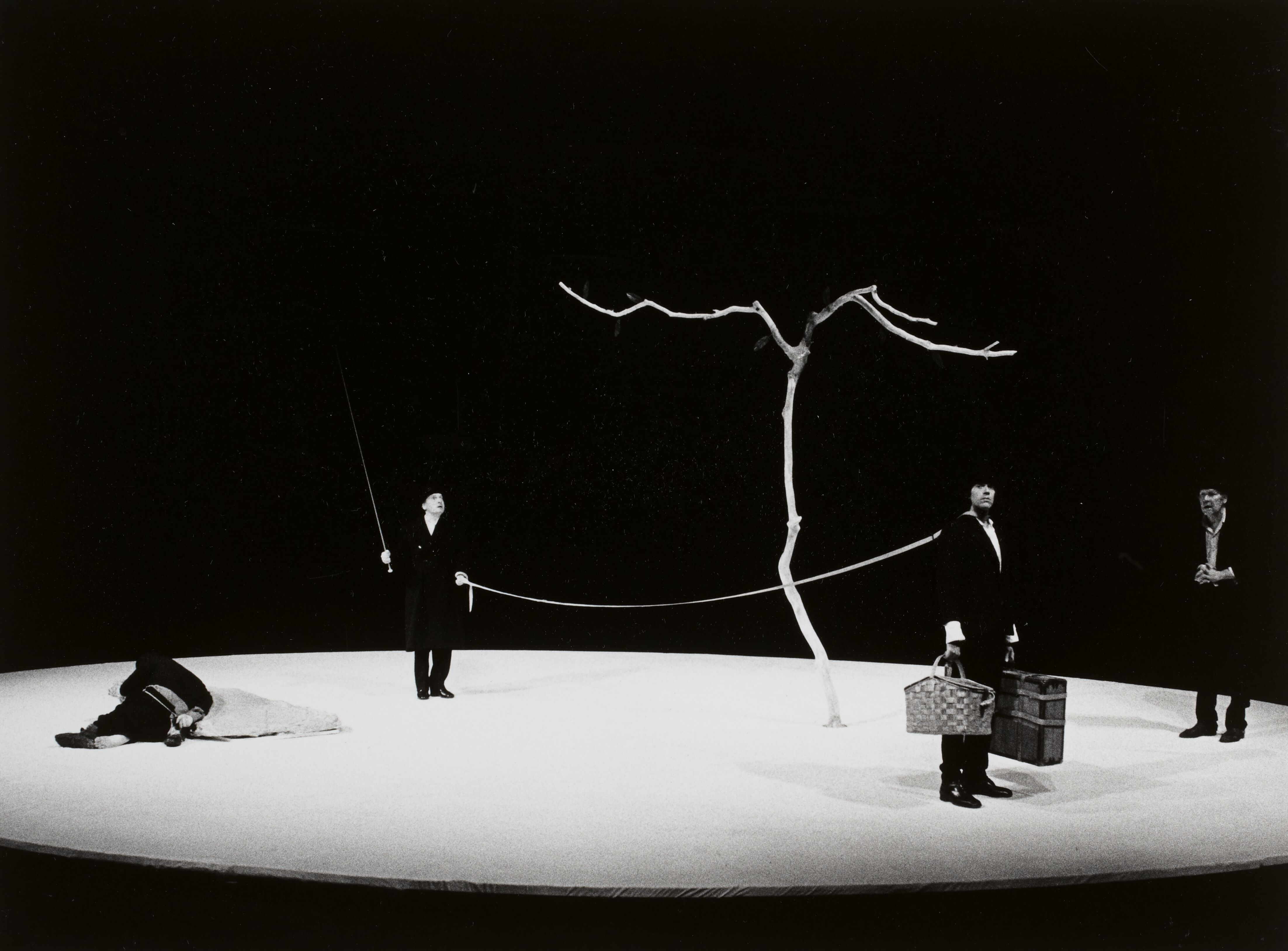 En attendant Godot, texte de Samuel Beckett, mise en scène de Otomar Krejca. Festival d'Avignon. 1978 / photographies de Fernand Michaud.